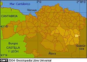 Localización de Zaldíbar en Vizcaya, EspañaMapa base generado con la aplicación Online Map Creation, Martin Weinelt (GMT) y límites municipales de Diputación Foral de Bizkaia (Cartografía y planes urbanísticos)